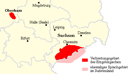 Verbreitungsgebiet des erzgebirgischen Dialekts